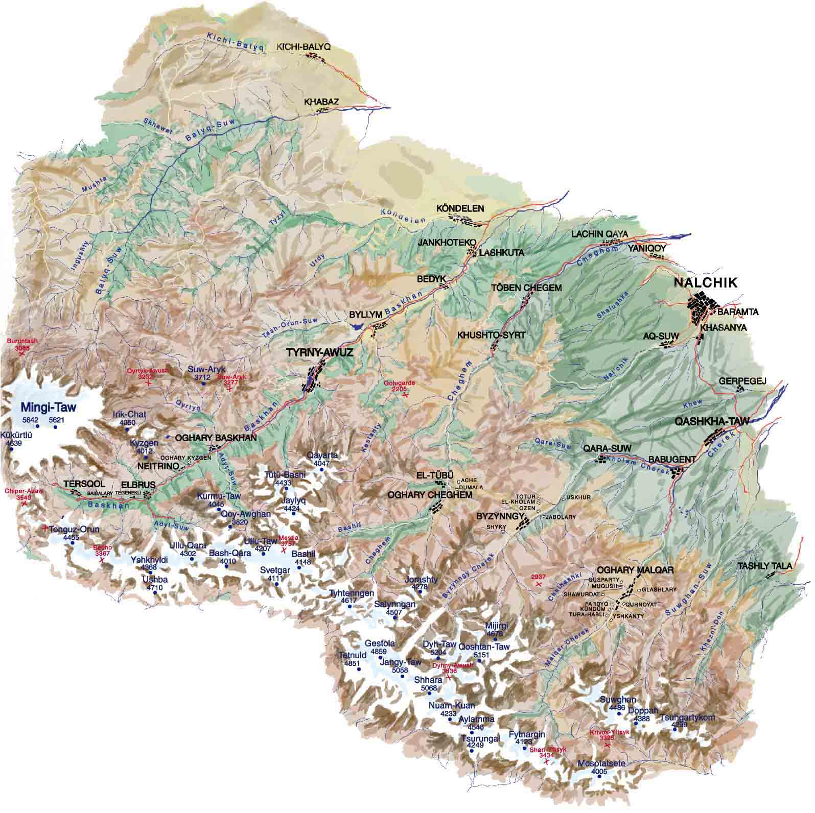 Къарачай-малкъар: Карта